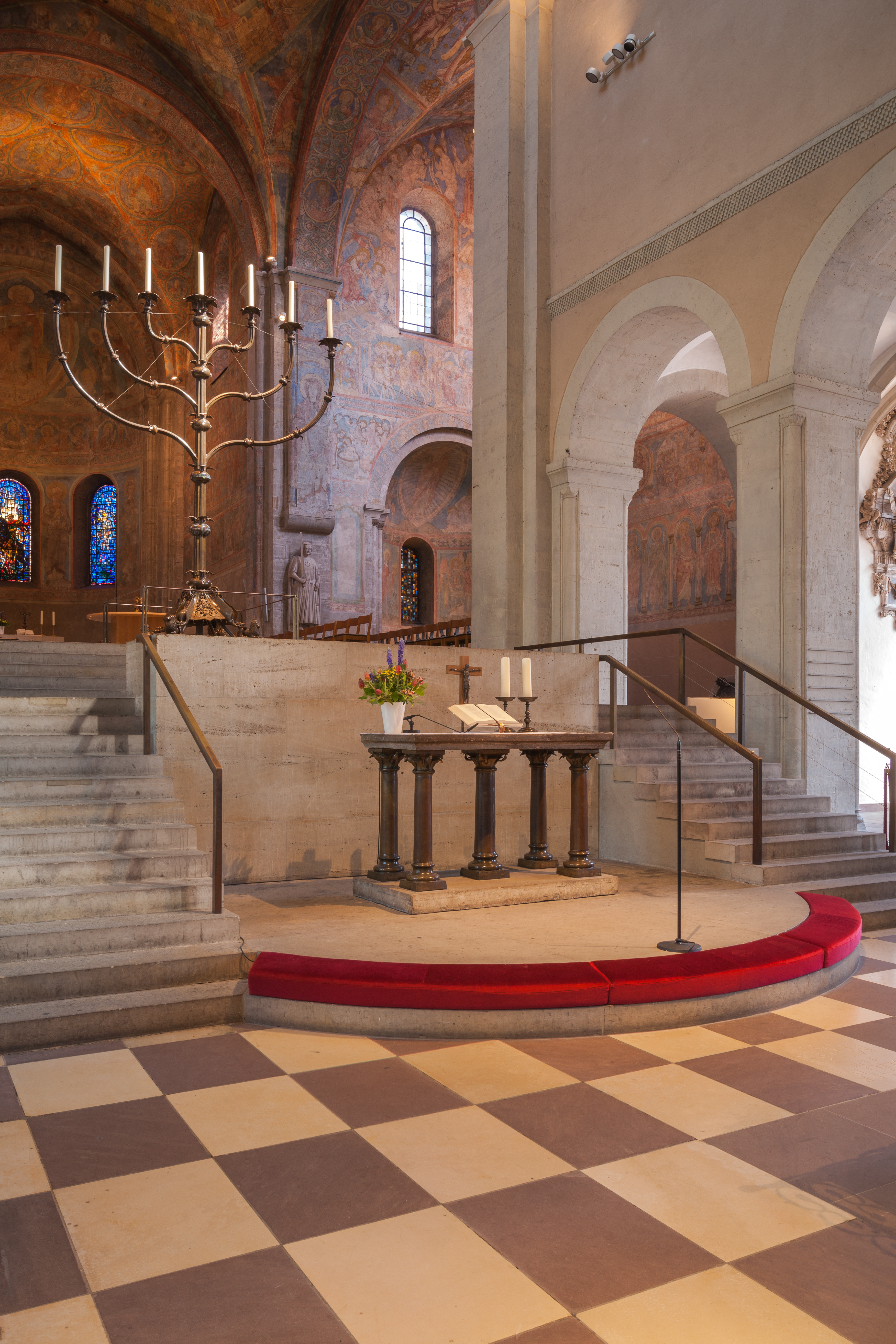 Braunschweiger Dom, Altar und Apsis mit dem Siebenarmigen Leuchter, Niedersachsen/Deutschland